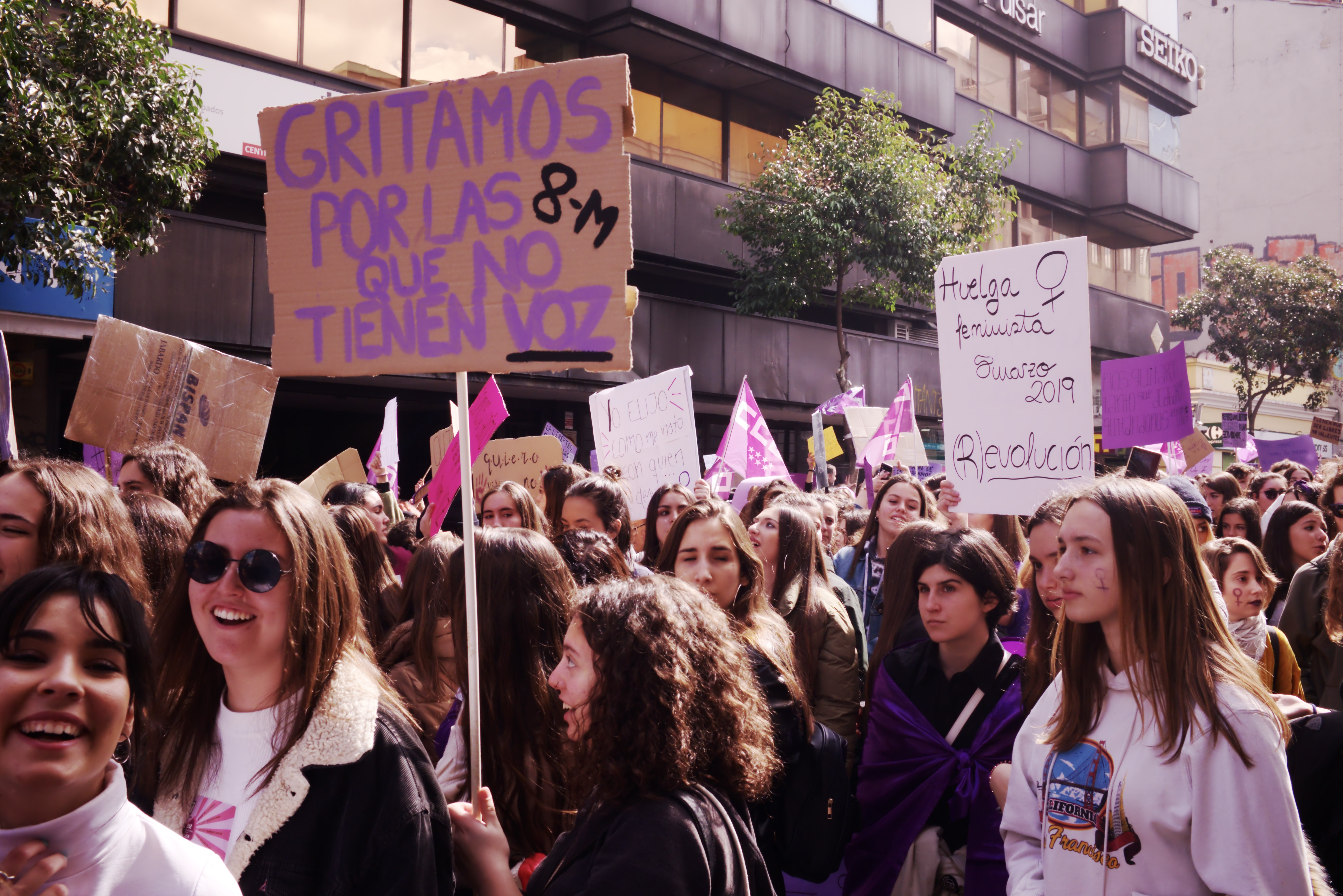 Madrid #8M